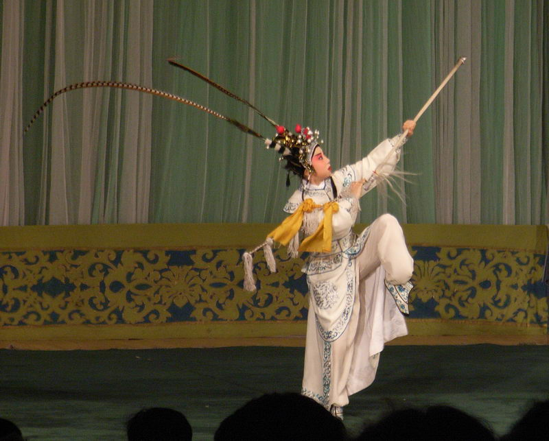 探谷破敌中的杨文广